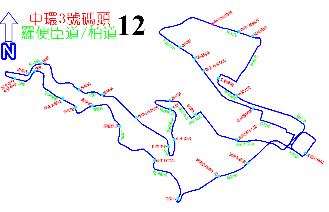 中文（香港）: 城巴12號線的走線圖